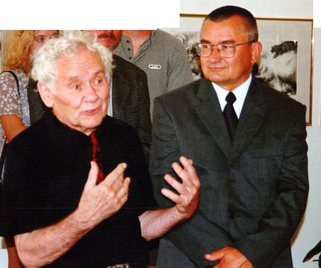 Feledy Gyula (balra) és Feledy Gyula Zoltán (jobbra)